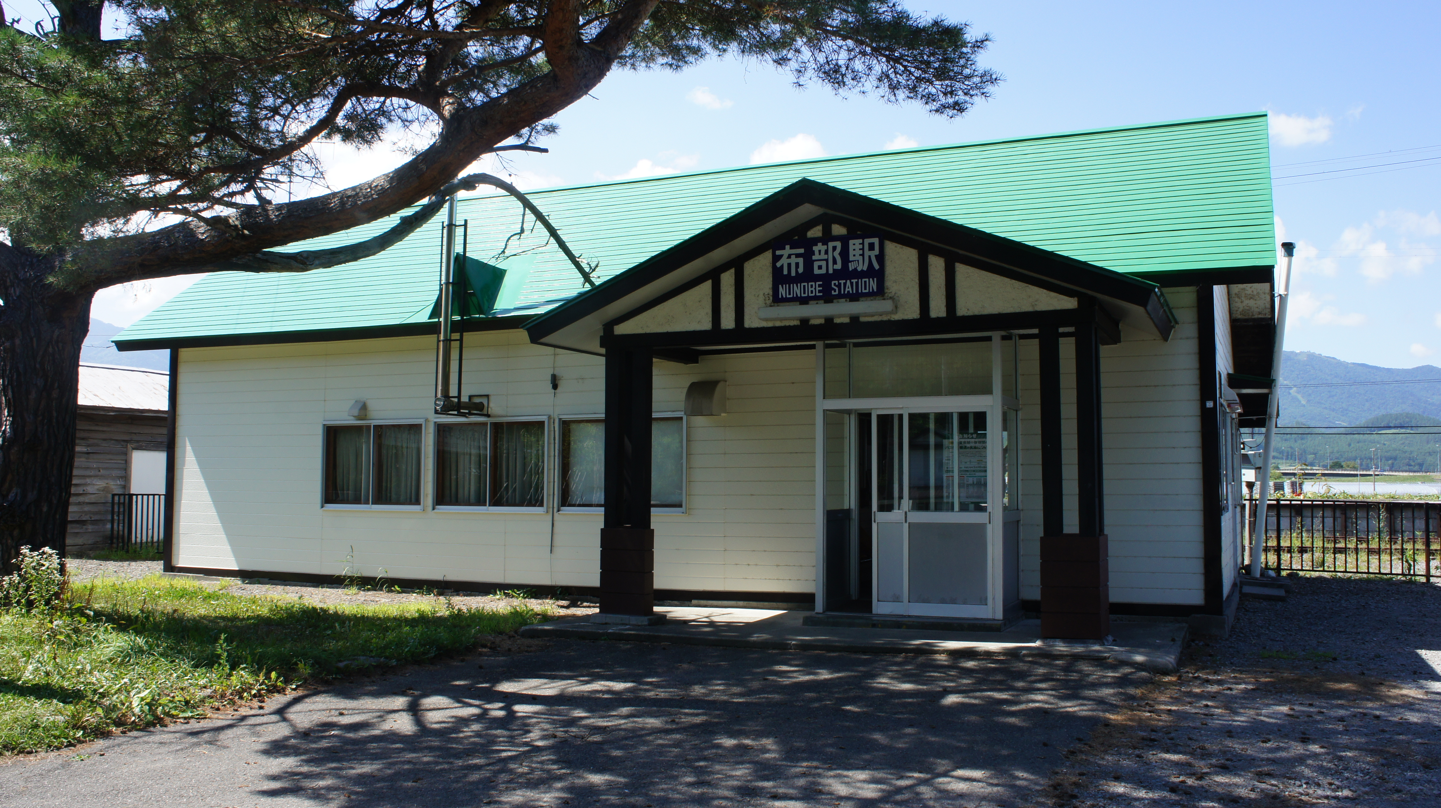 JR根室本線・布部駅の駅舎